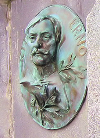 Kiss Ernő. Dombormű az aradi Szabadság-szobor talapzatán. ; saját 02